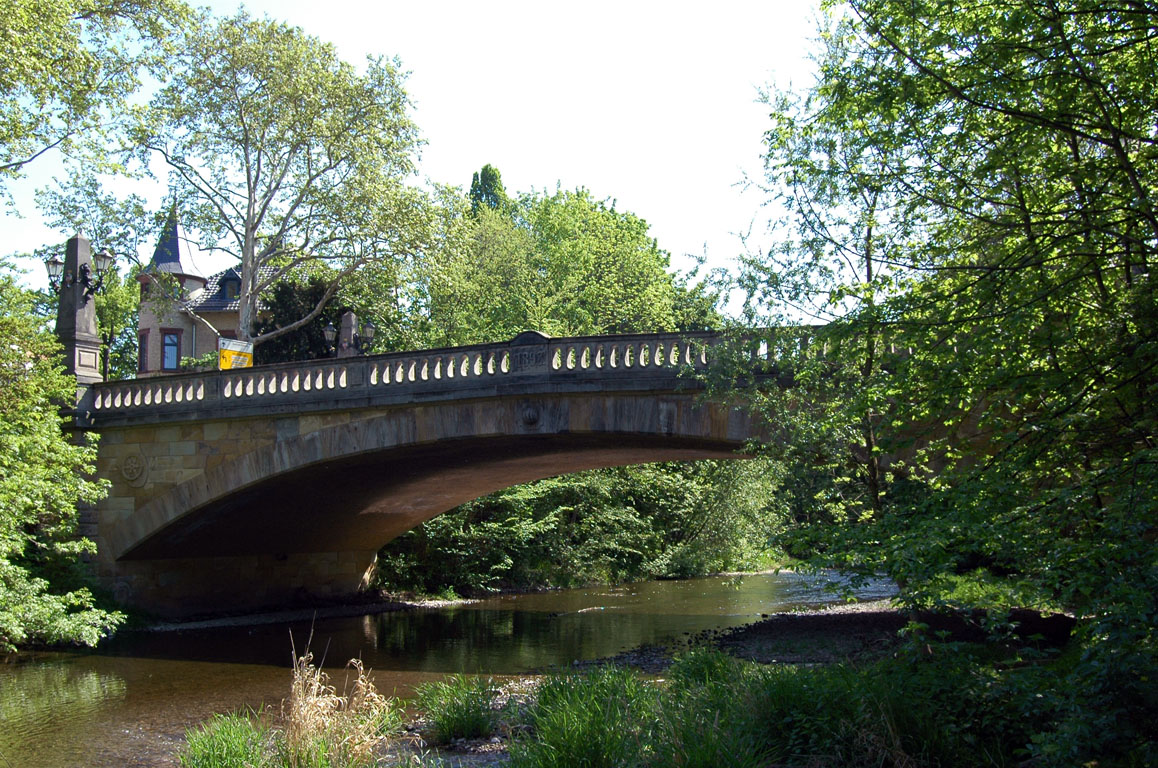 Pförtchenbrücke (errichtet 1897) in der Pförtchenstraße in Erfurt